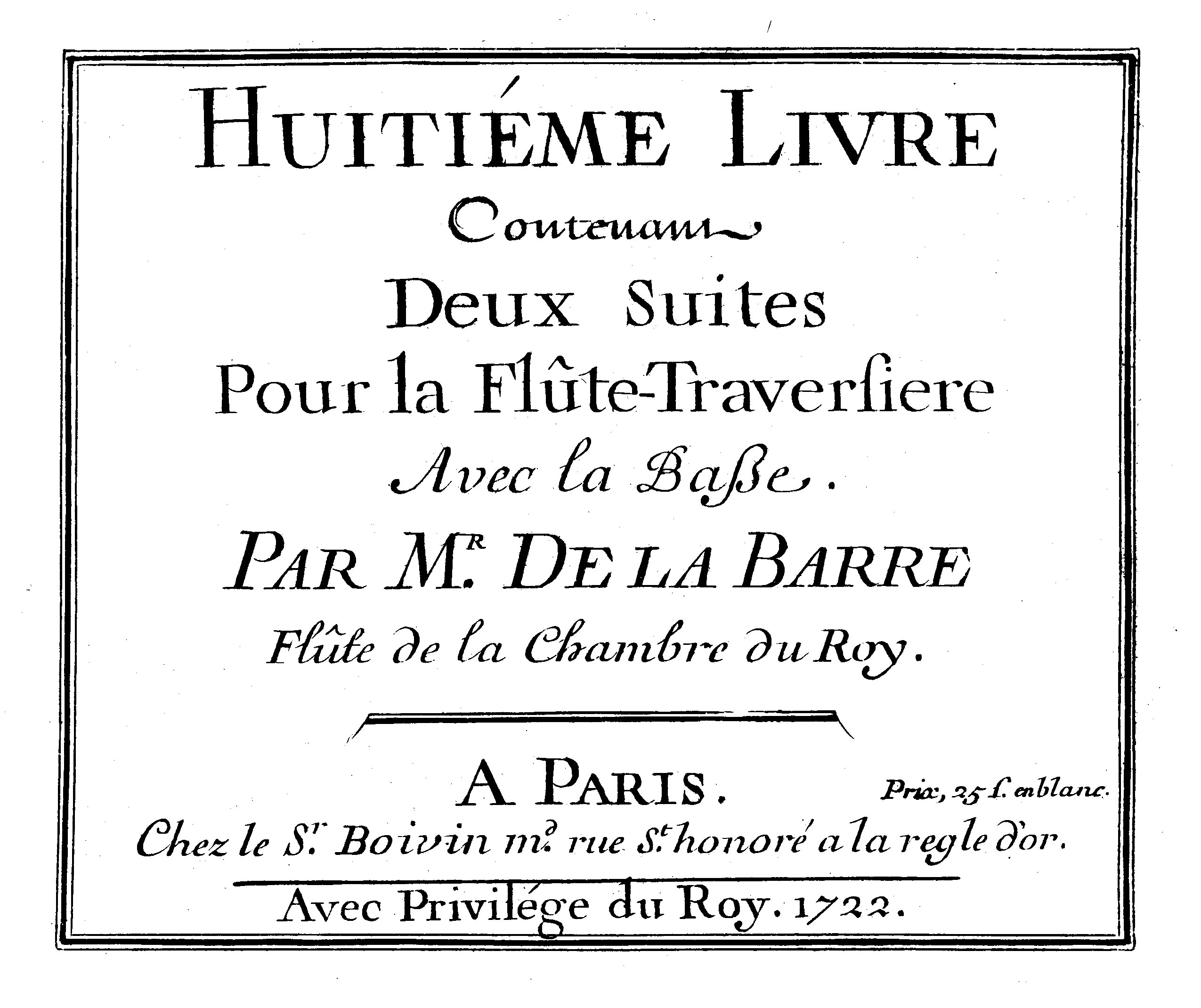 8e Livre pour la flûte